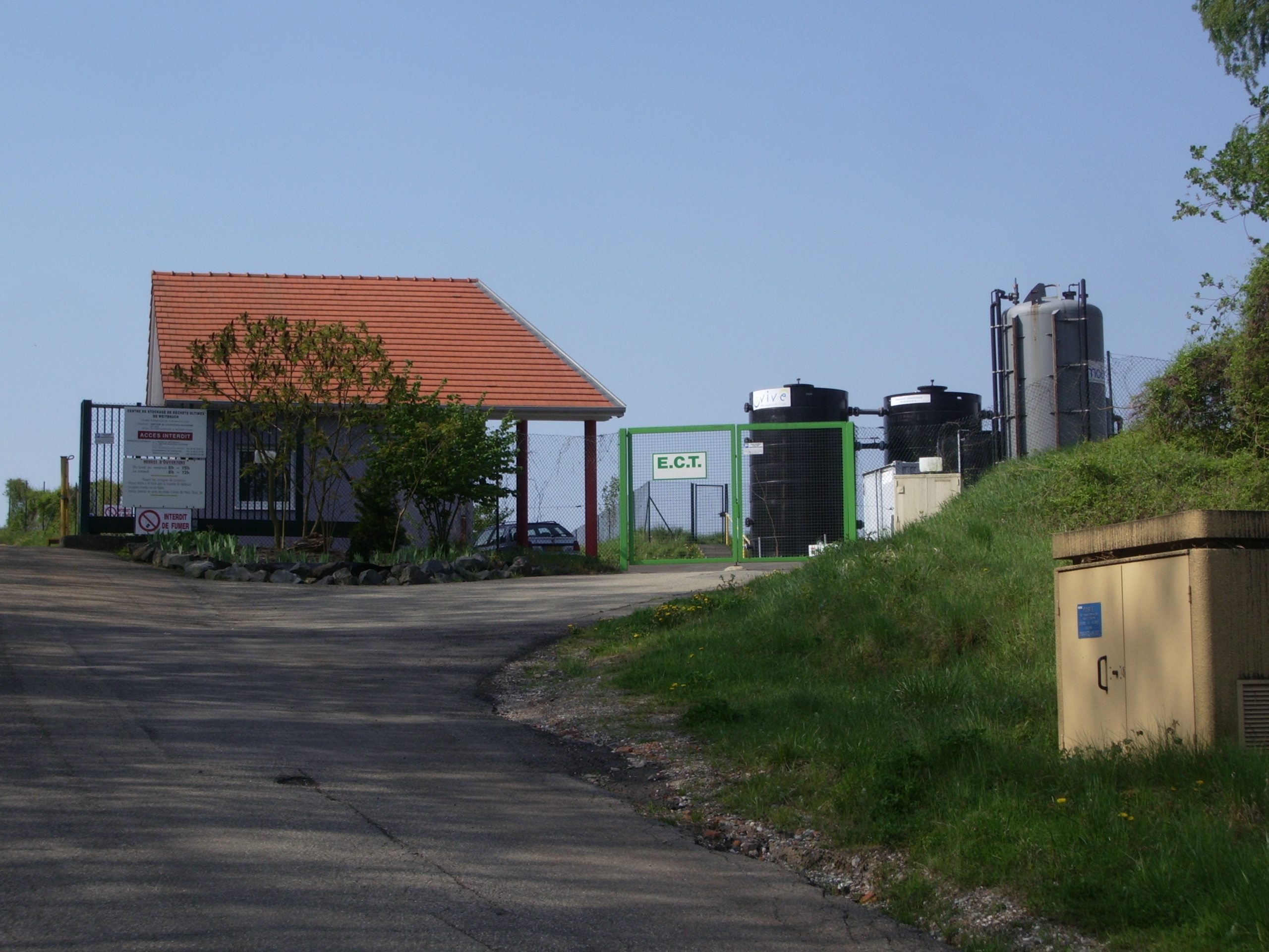 Vue de l'entrée de la déchetterie de Weitbruch.